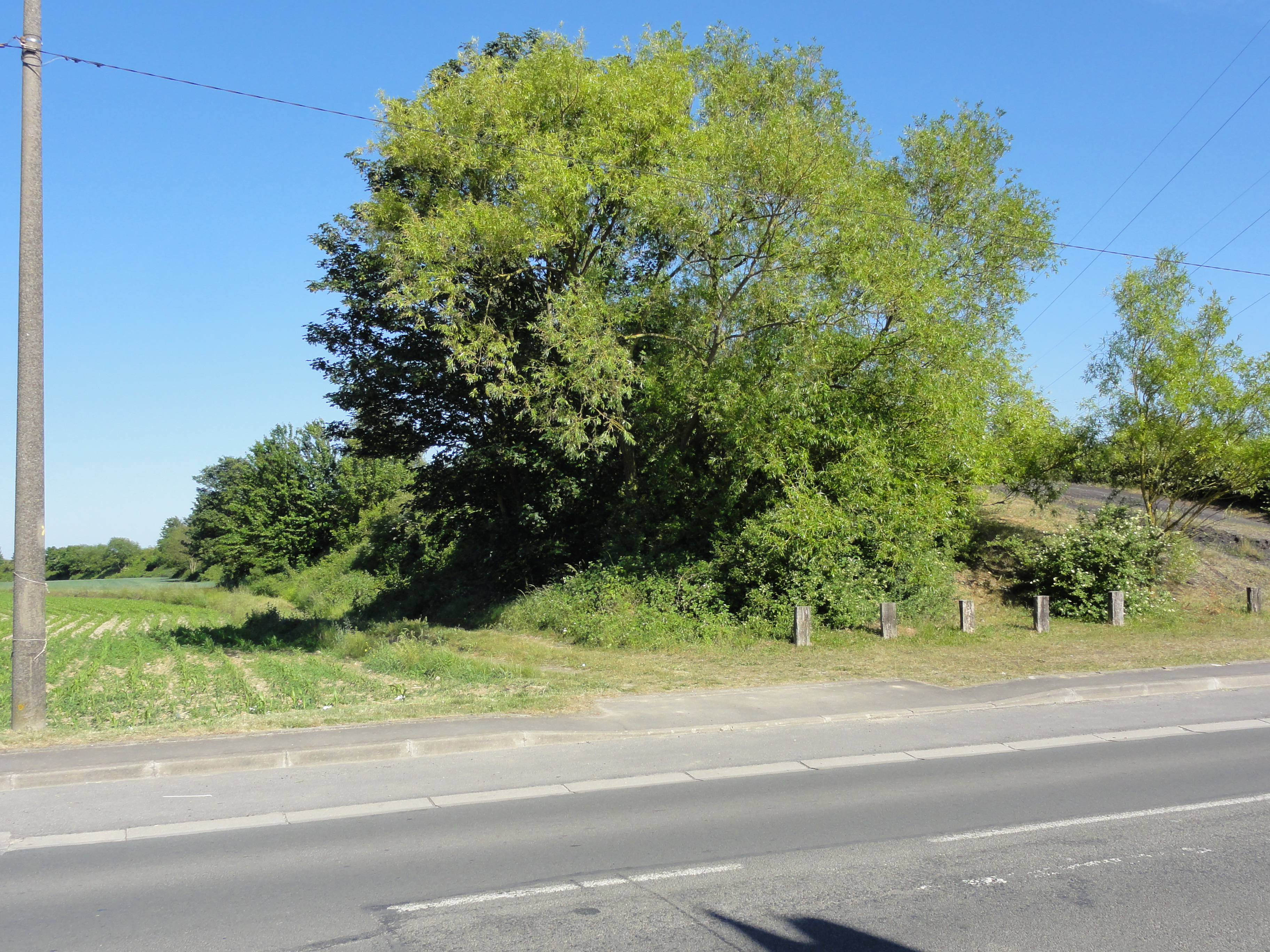 Terril n° 73B dit Cavalier du 18 de Lens, Fosse n° 18 - 18 bis du Groupe de Lens, Haisnes, Pas-de-Calais, Nord-Pas-de-Calais, France.